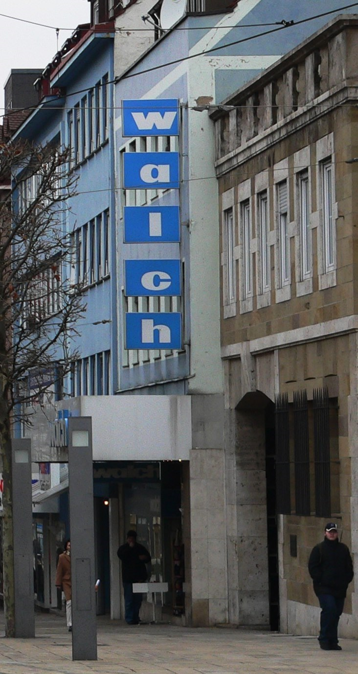 Schuhaus Walch (Kaiserstraße 33) u. Dresdner Bank (Kaiserstraße 35)